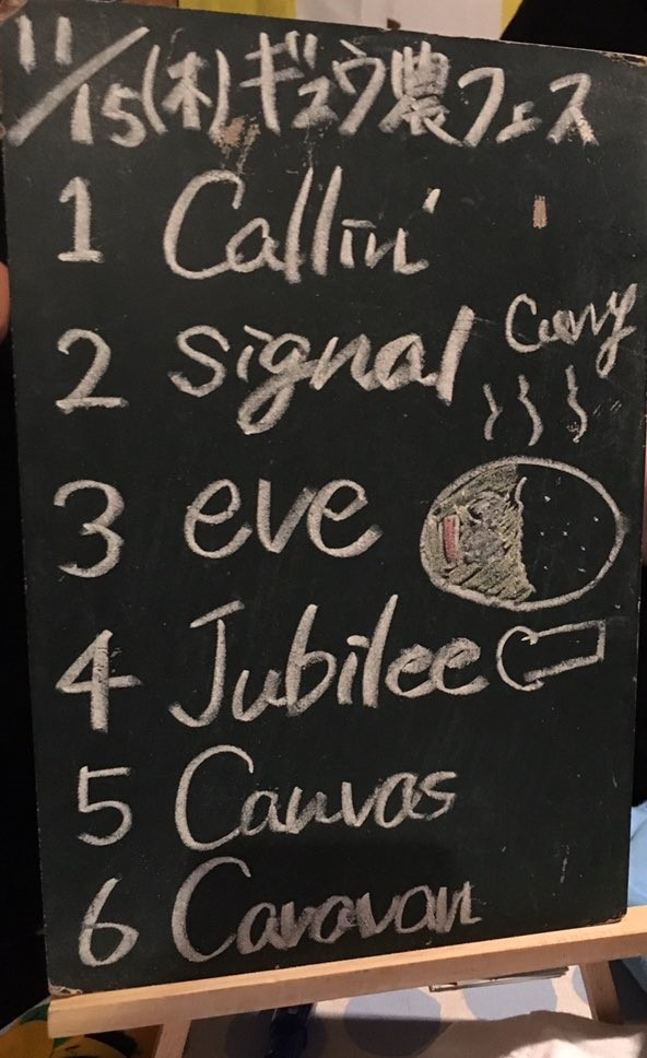 amiinAセトリボード(20181115(1))